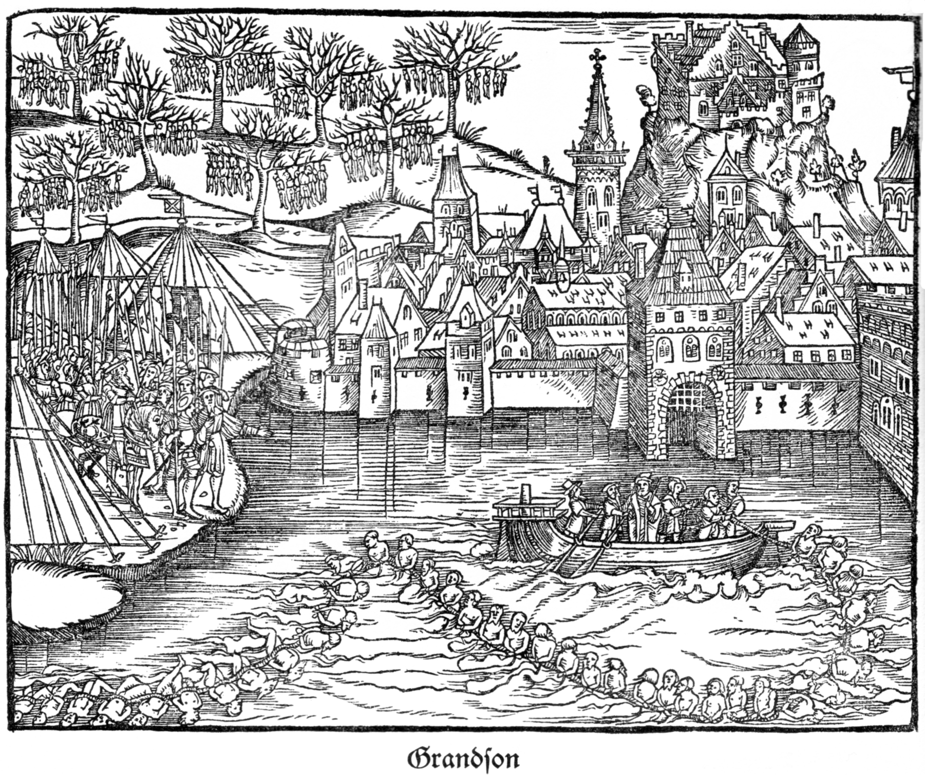 Die Hinrichtung der bernischen Besatzung von Grandson nach der Einnahme der Stadt durch den burgundischen Herzog Karl den Kühnen am 28. Februar 1476. Darstellung aus der STumpf'schen Chronik